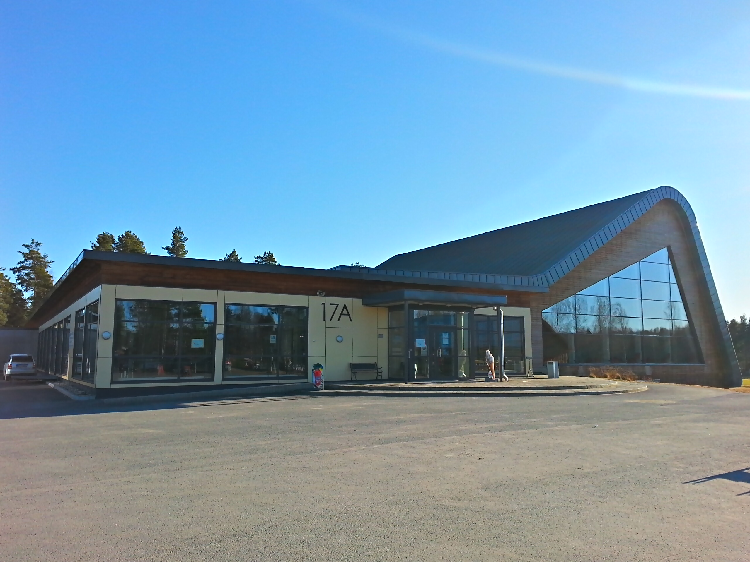 Ringeriksbadet i Hole kommune i Buskerud.